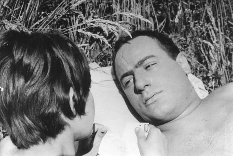 Zentralbild-DEFA Ge-At. 14.1.1963 Der DEFA-Film "Beschreibung eines Sommers"... nach dem Roman von Karl-Heinz Jakobs, wird als Beitrag zum VI. Parteitag der SED am 15.1.1963 im Berliner Colosseum uraufgeführt. Christel Bodenstein und Manfred Krug spielen die Hauptrollen. Regie führte Ralf Kirsten. UBz.: Eine Szene aus dem Film mit Christel Bodenstein als Grit und Manfred Krug als Tom."